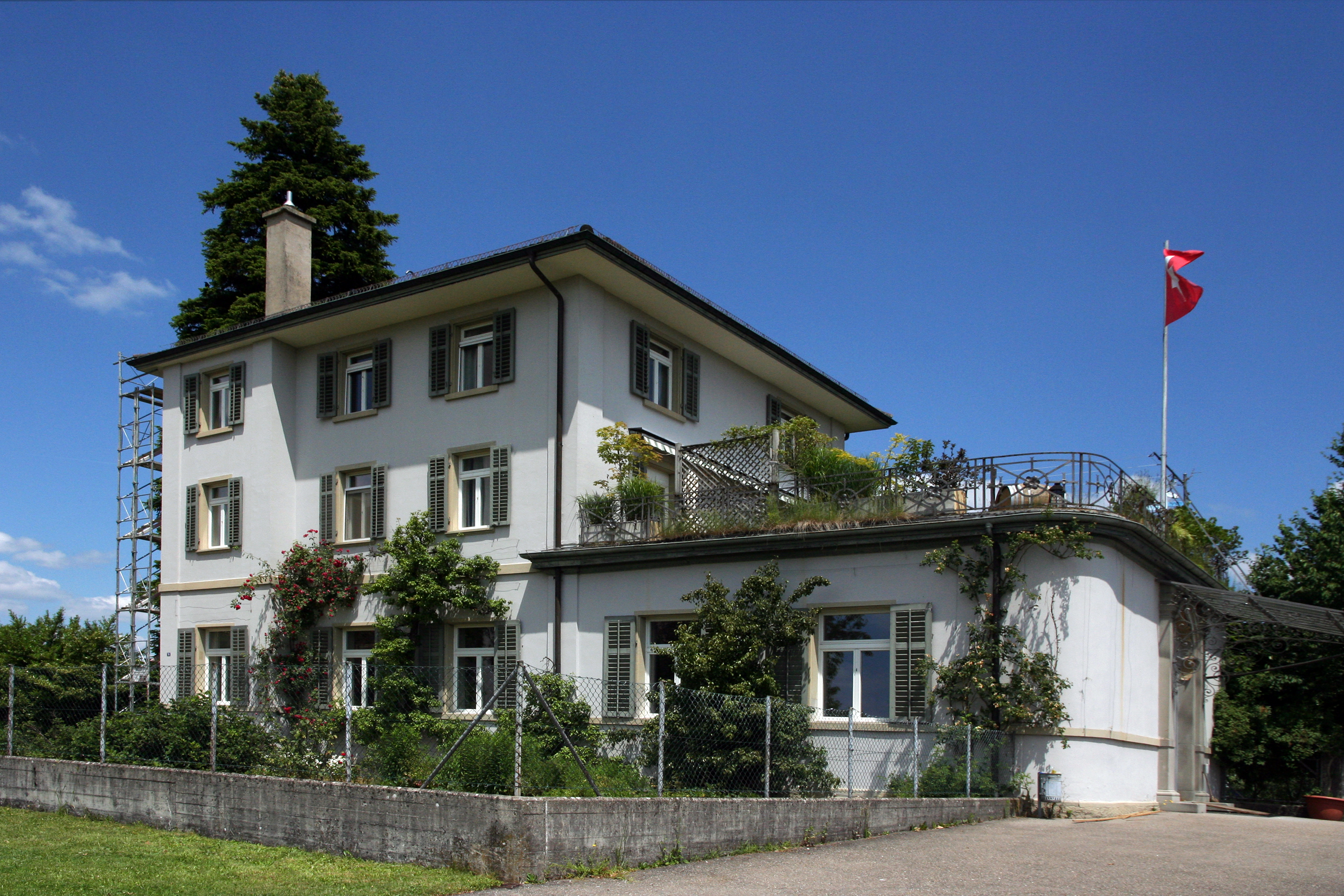 Römisch-katholische Pfarrkirche St. Franziskus Wetzikon, Pfarrhaus